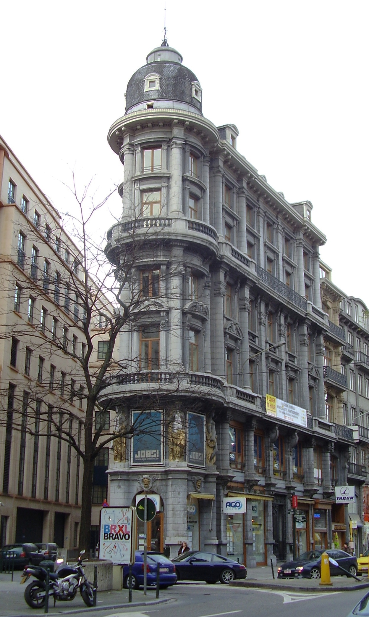 Immeuble, Boulevard Adolphe Max - Bruxelles - architecte A. Vanderheggen, 4ème prix du concours d'architecture de 1876